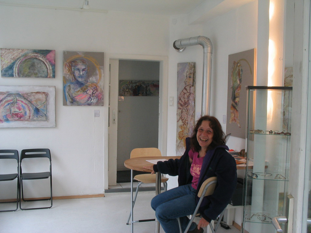 Ausstellung in Tübingen